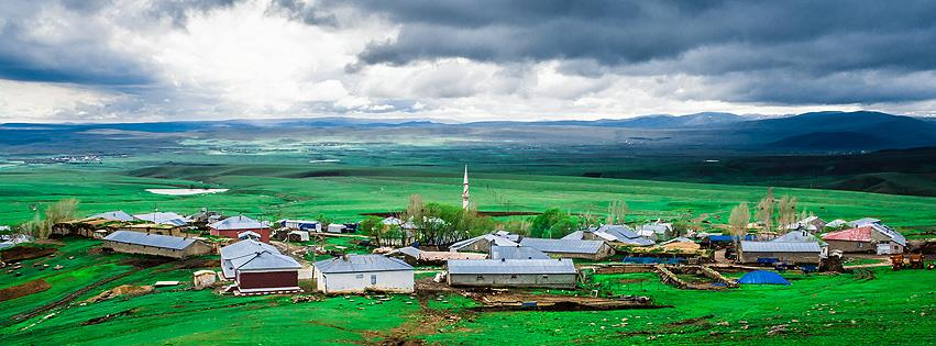 Ekincek (sevik) köyü